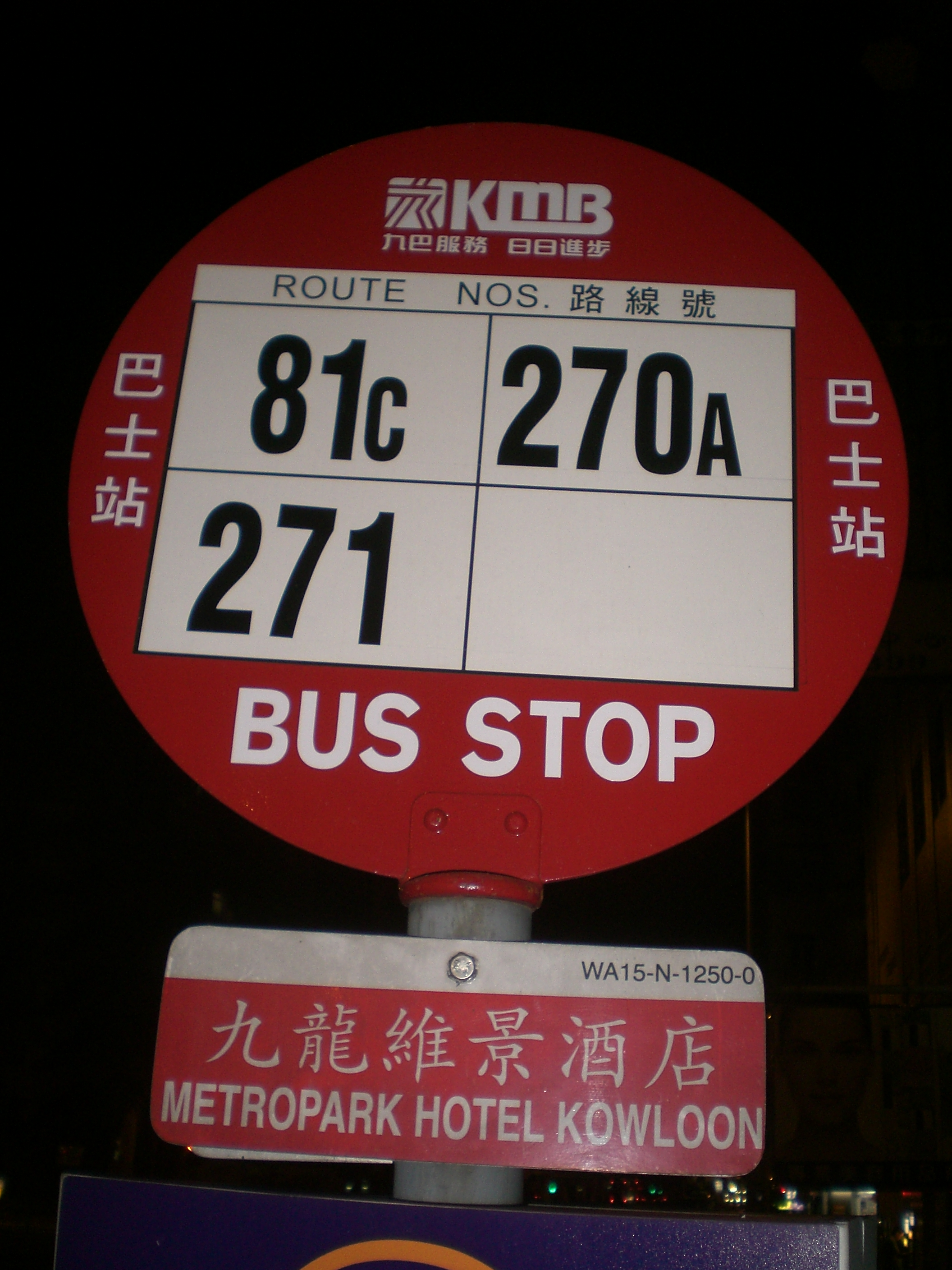 九龍巴士站，近九龍維景酒店前門。